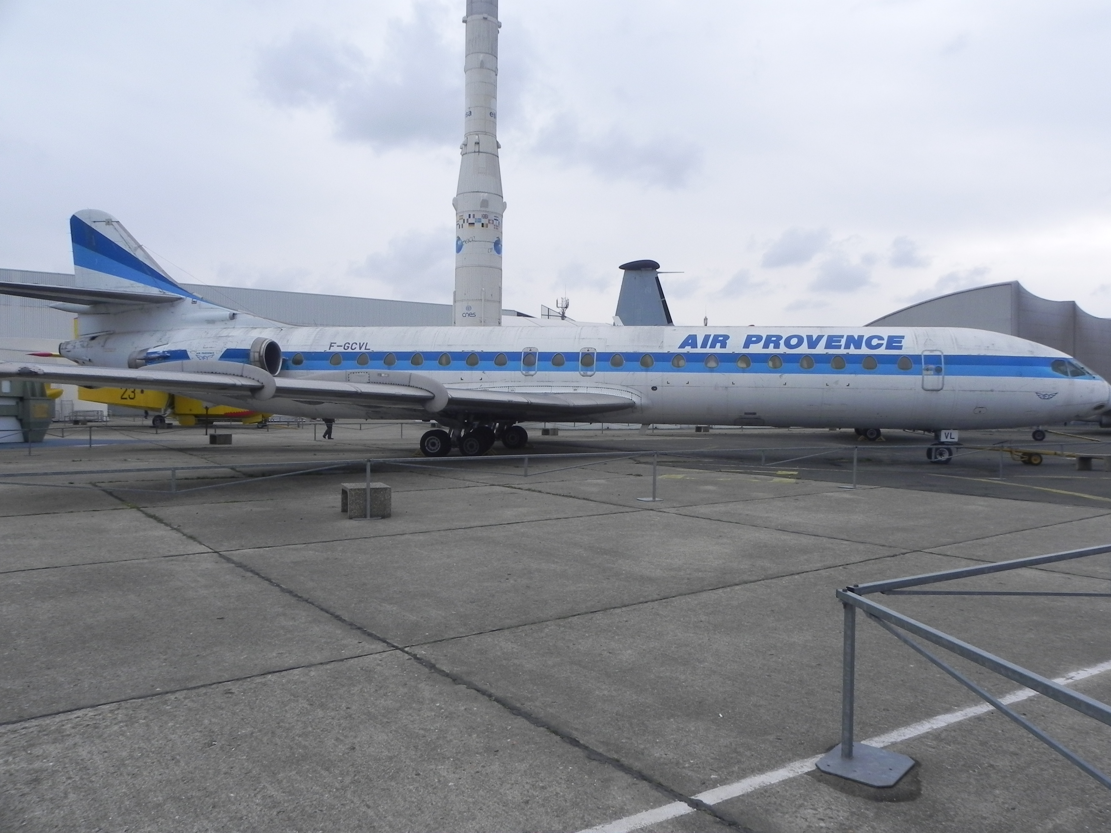 Caravelle n° 273 (F-GCVL) au musée du Bourget